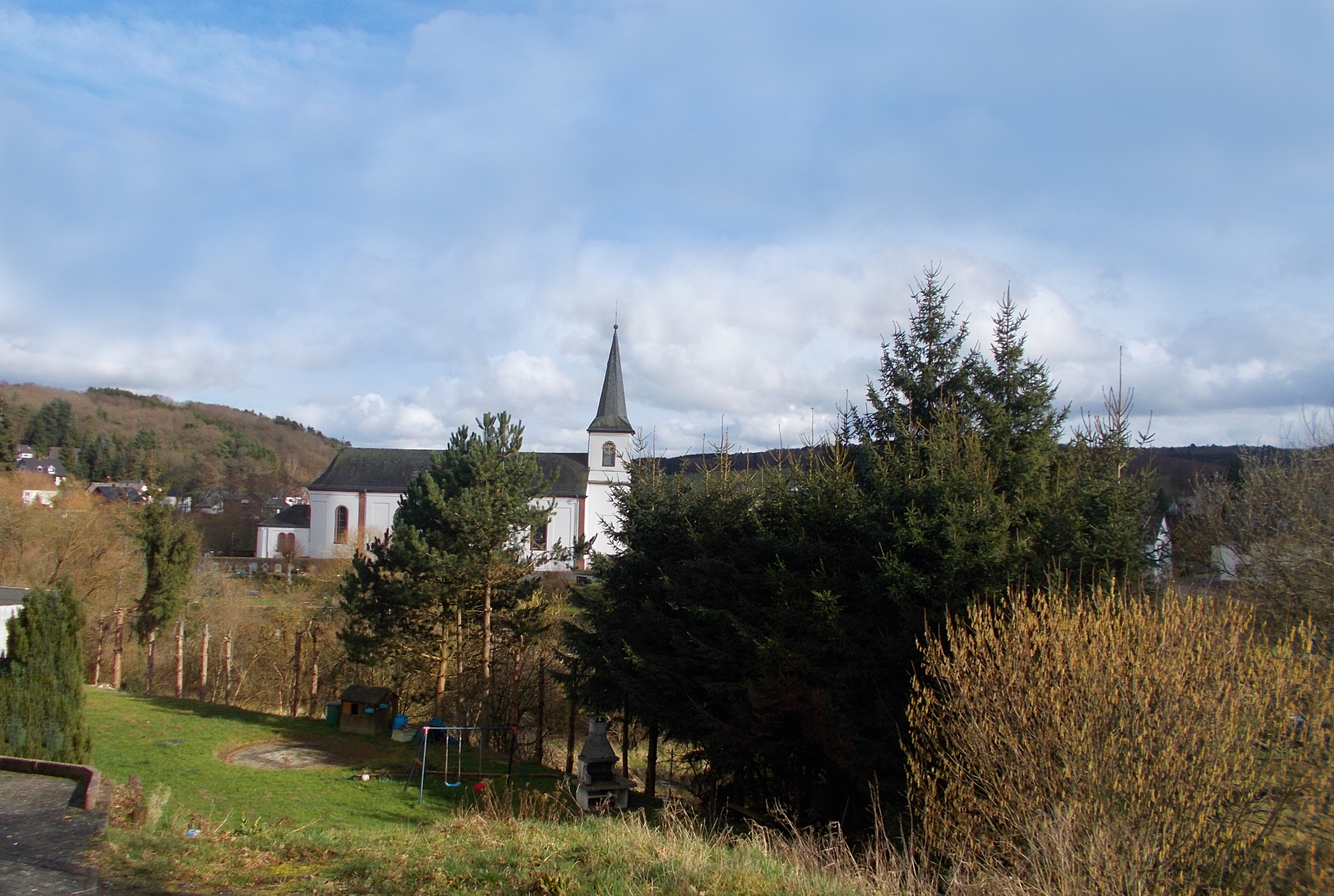 Katholische Pfarrkirche St. Laurentius; klassizistischer Saalbau mit Turmfassade, 1819/29; zugehörig Pfarrhaus von 1750, Kapelle, Vorplatz, Kirchhof und Umgebung, Blick über Großbach und Ruwer aus Westen her